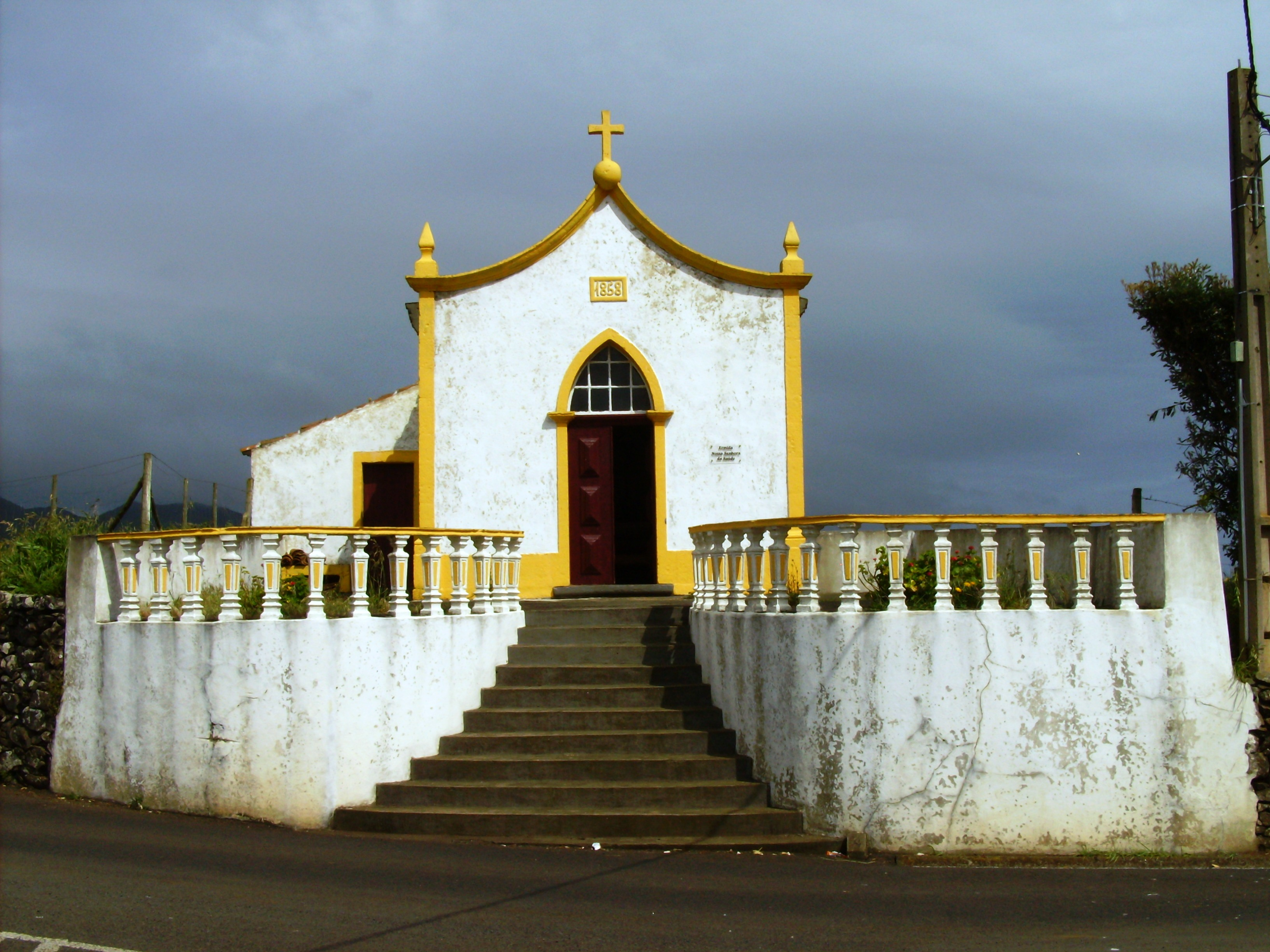 Ermida de Nossa Senhora da Saúde, Ilha de Santa Maria (Açores), Portugal.